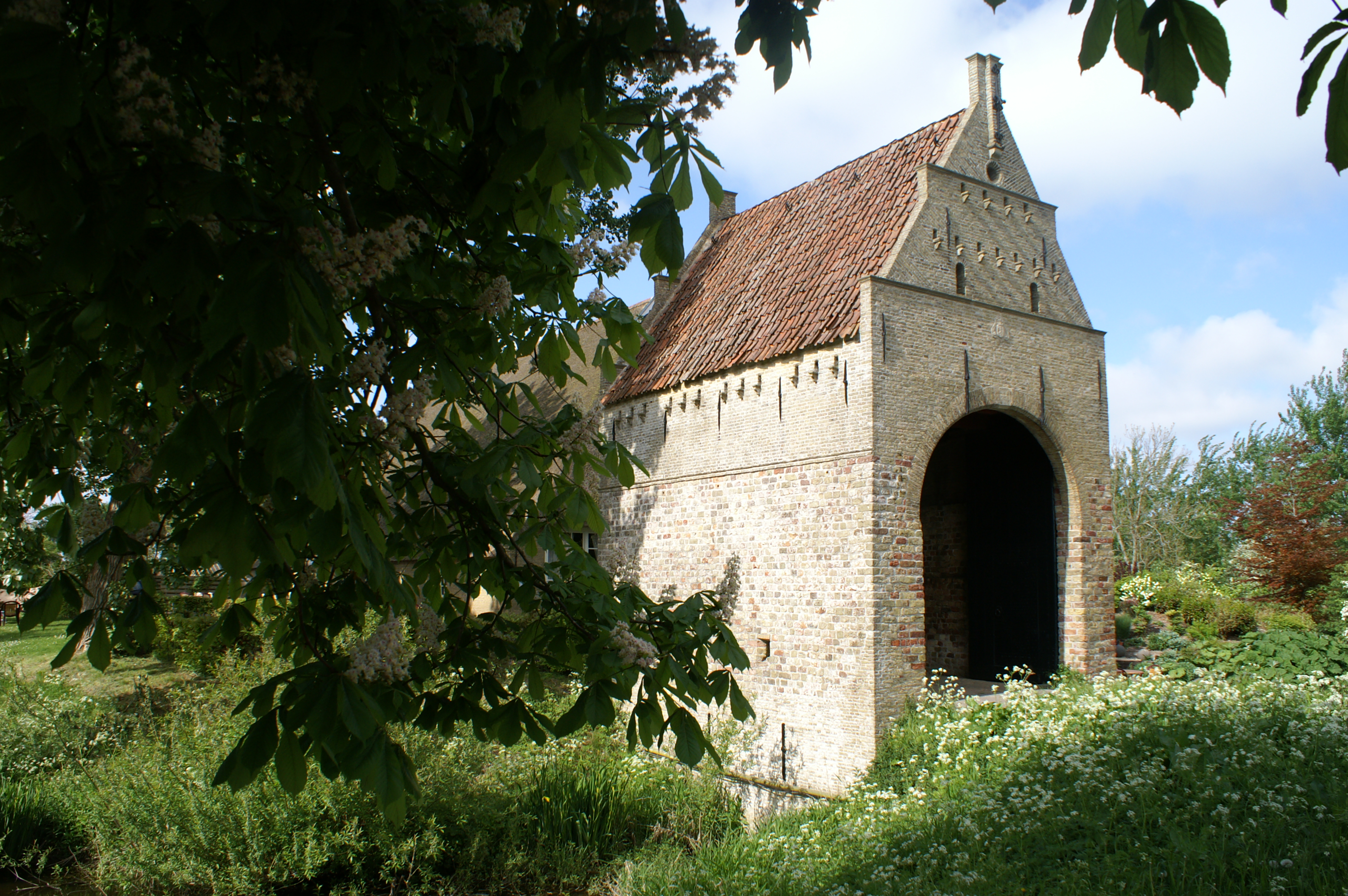 Stinspoort van het verdwenen Liauckama-State.